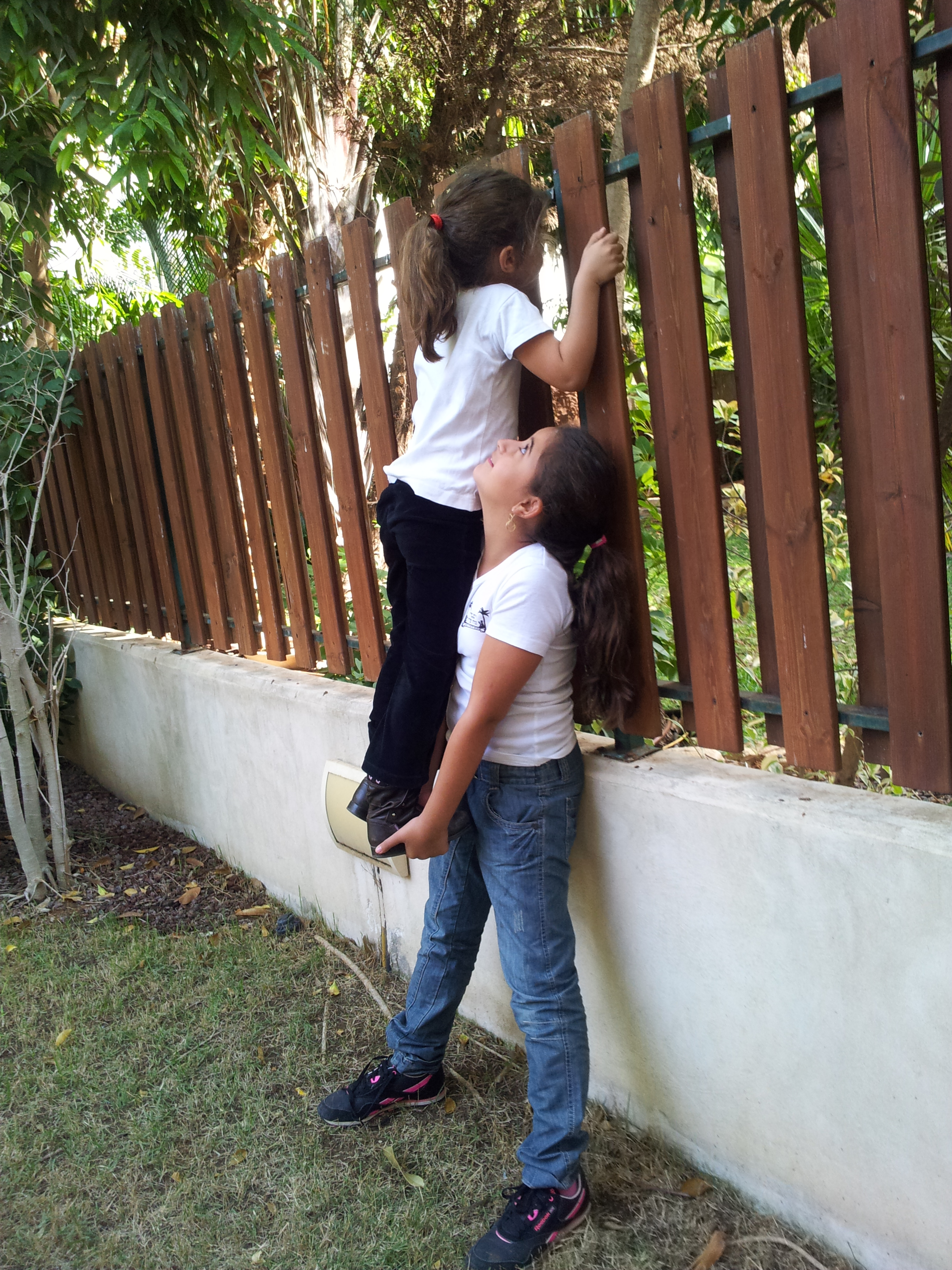 סולם גנבים שילדה מבצעת עבור ילדה אחרת בראשון לציון